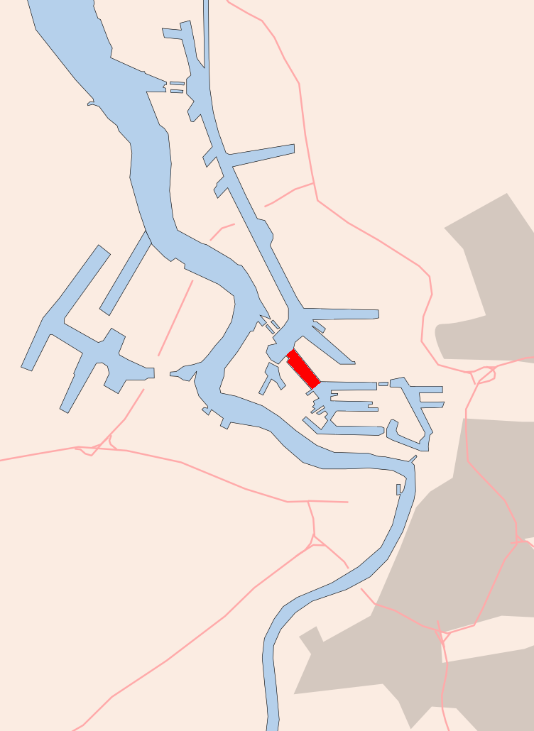 Antwerp , Hansadok